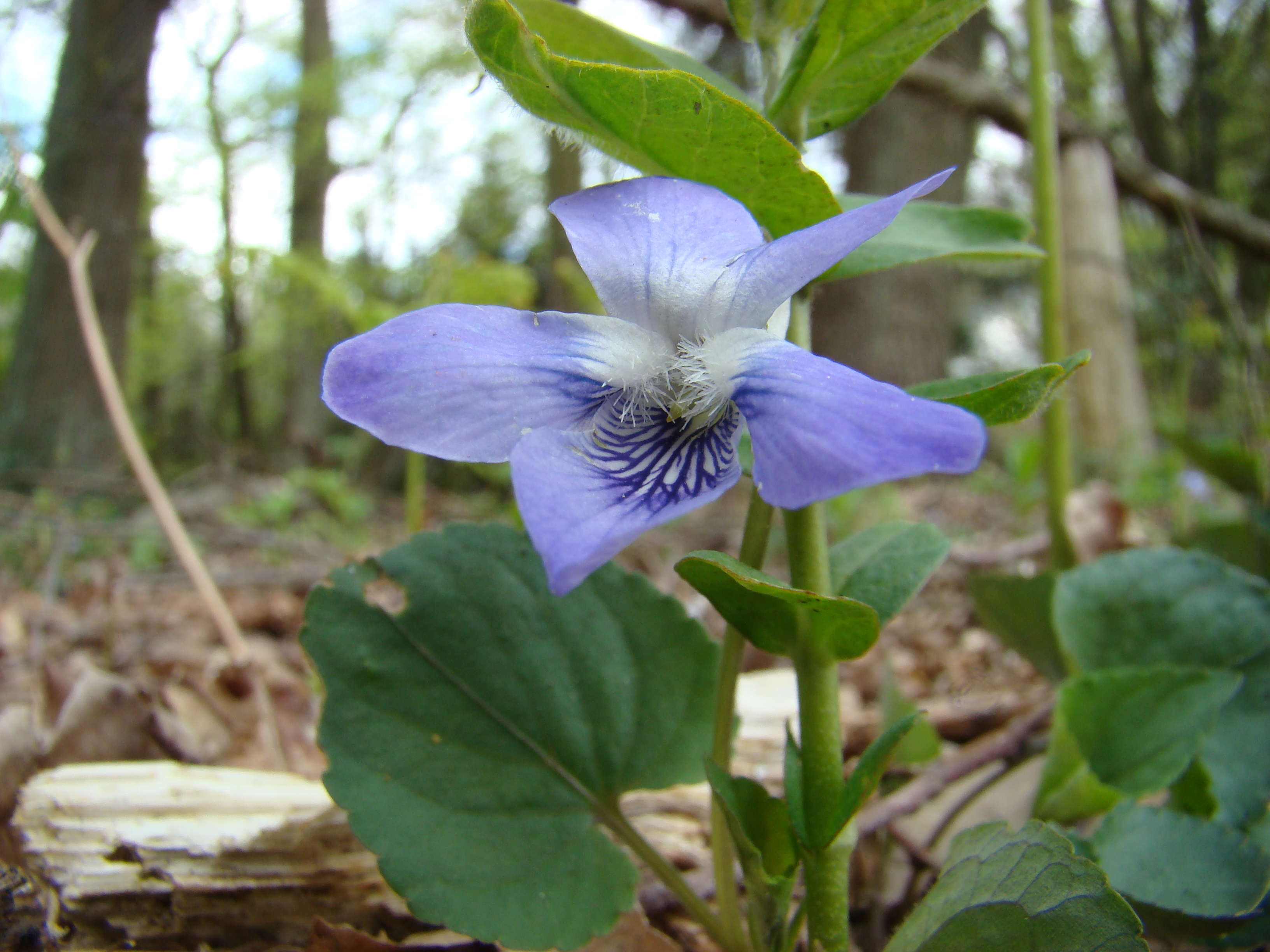 Veilchen im Naturpark Südheide, Niedersachsen, Germany